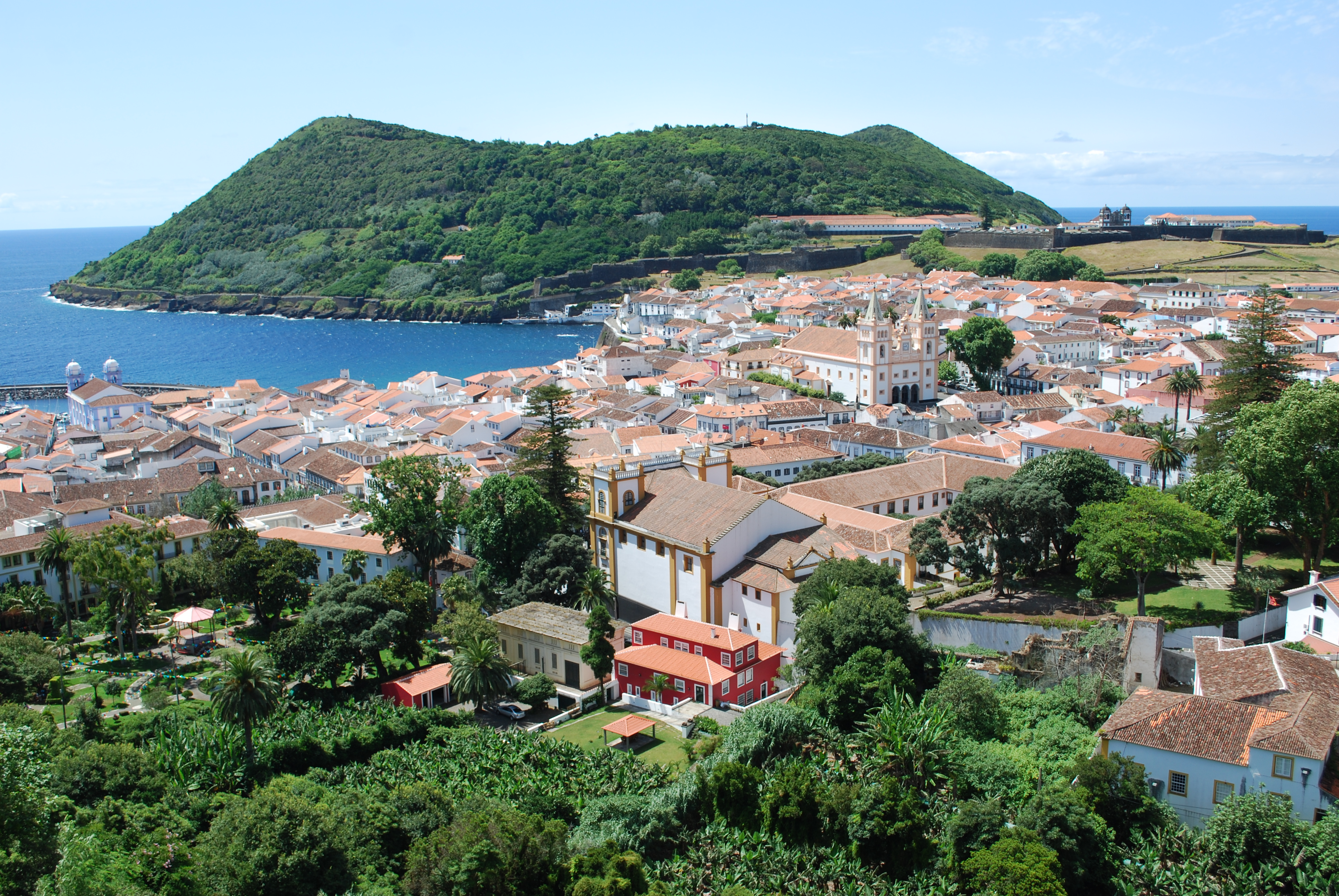 Vista da zona central da cidade de Angra desde o Outeiro da Memória, com a Sé no centro, a Igreja do Colégio (ou Nossa Senhora do Carmo) em baixo e a Igreja da Misericórdia na esquerda.